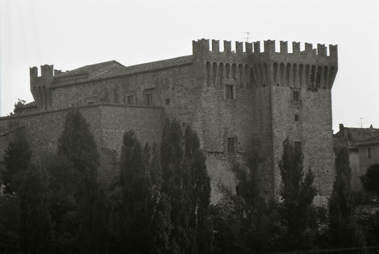 Servizio fotografico : Piandimeleto, 1981 / Paolo Monti. - Strisce: 2, Fotogrammi complessivi: 6 : Negativo b/n, gelatina bromuro d'argento/ pellicola ; 35 mm. - ((Sul portanegativi: N[I]K[MA]T FP4 e iscrizione: "2-7 Piandimeleto". - La serie è identificata da Monti con segni grafici e distinta dalla successiva. - Occasione: Campagna di rilevamento dei Castelli di Francesco di Giorgio Martini. - Fonte: Agenda di Paolo Monti: Nikon Leika 3001-/ Monti 1978 (1978-1982), presso Archivio Paolo Monti. - Fonte: Fattura di Paolo Monti: IV. Commesse/ Fattura n. 09/ Fotografie dei Castelli di Francesco di Giorgio Martini (1982/04/28), presso Archivio Paolo Monti. Secondo viaggio per fotografie interni Castello di Mondavio. Ingrandimenti per Mostra dei Castelli indicati: n. 30 stampe formato 40x60.